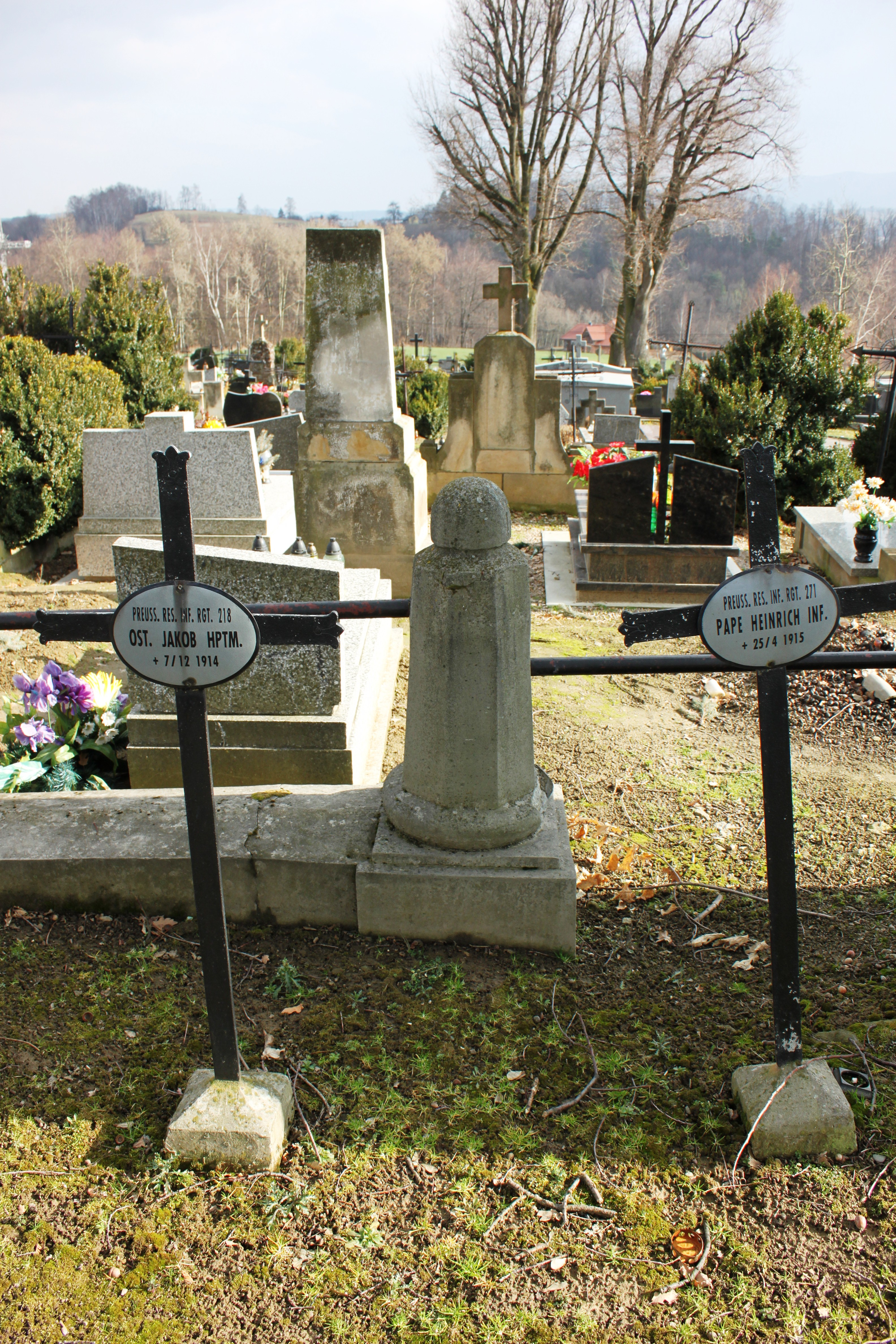 Trzciana, cmentarz wojenny nr 309 z I wojny światowej